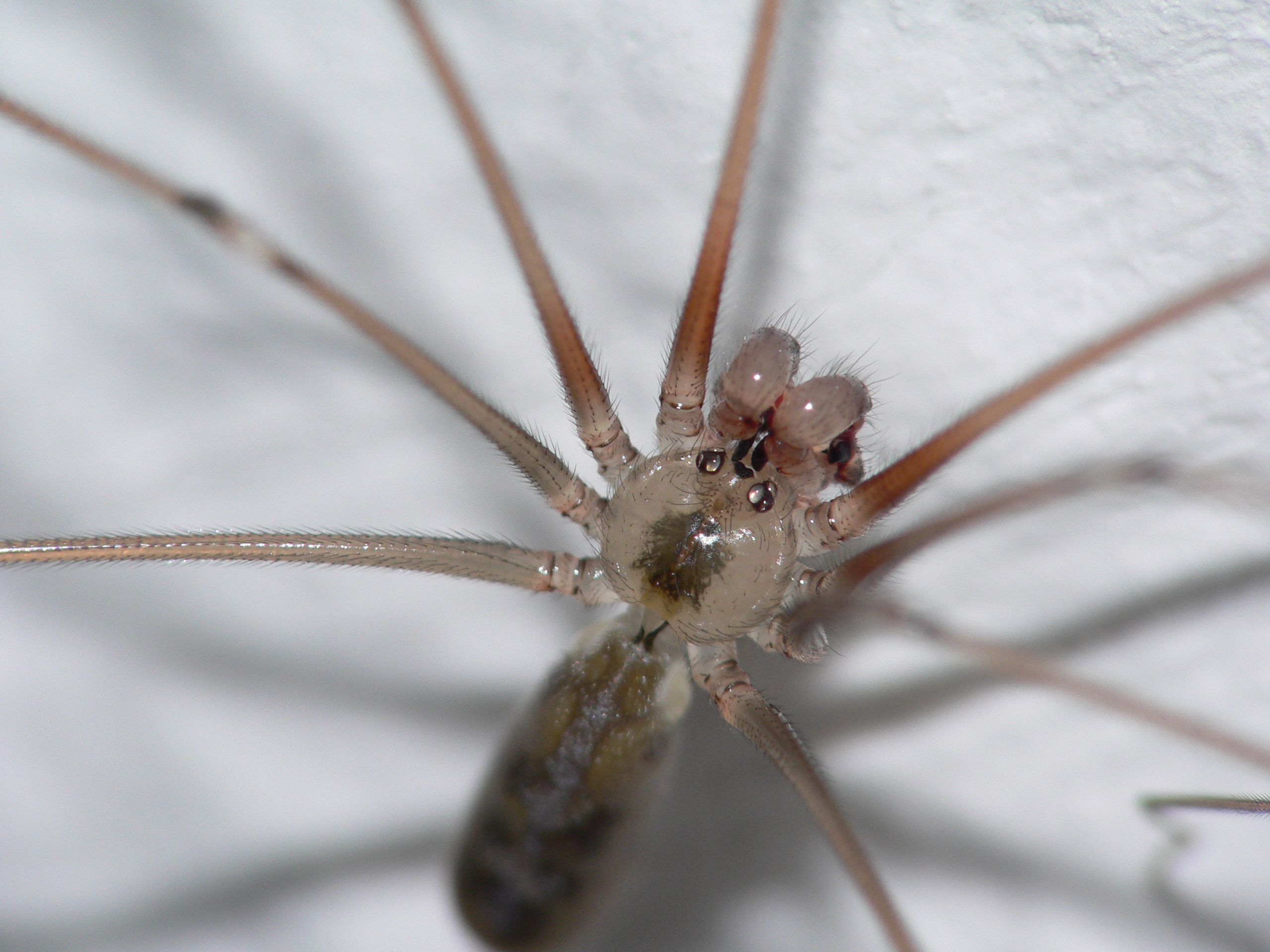 pholcus phalangioides (Fuesslin 1775)